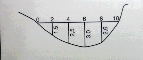 Српски (ћирилица): Скица овлаженог профила речног корита добијена мерењем ширине и дубине реке.